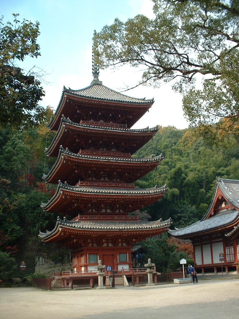 明王院五重塔（投稿者撮影）